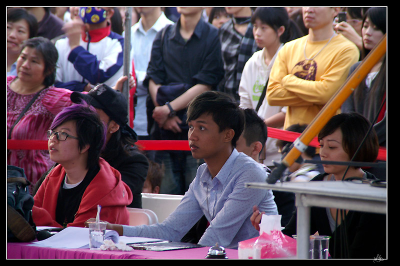 賴聖恩出席超級星光大道第五屆徵選